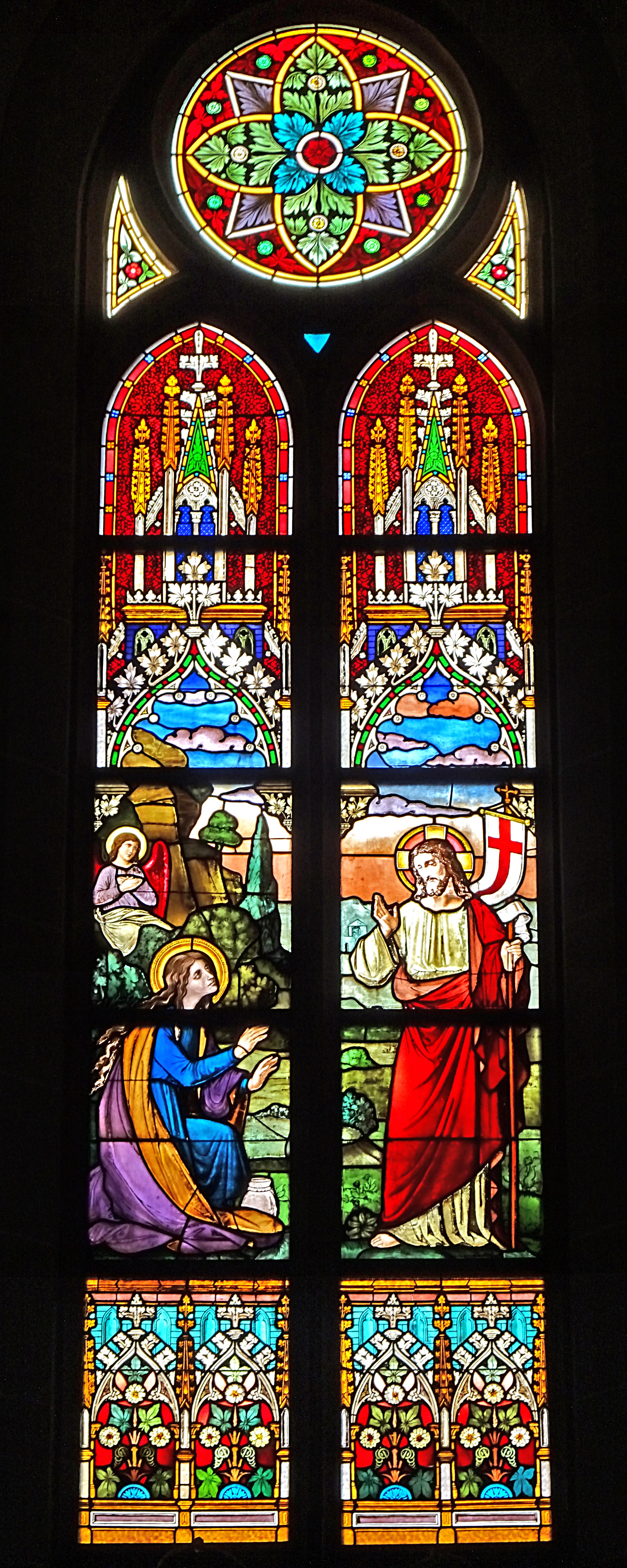 Buntglasfenster im Chor der Pfarrkirche St. Maria Magdalena (Leinefelde)